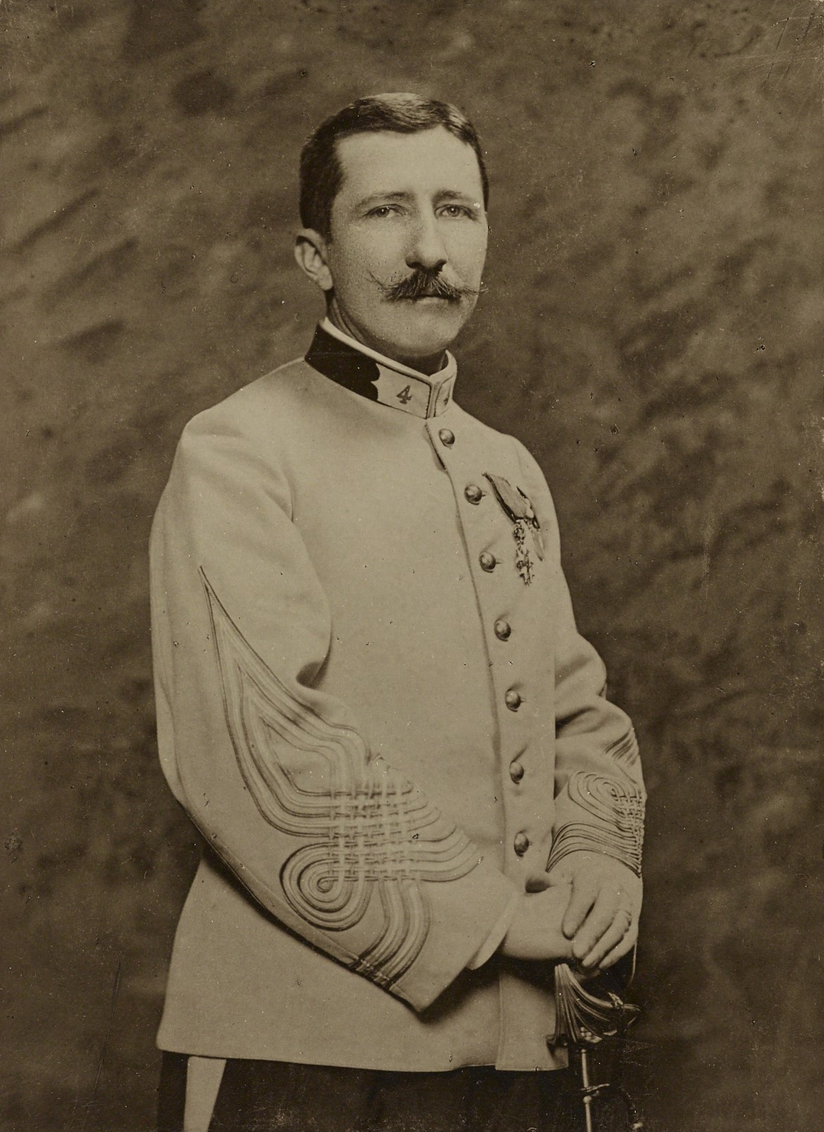 Photo du colonel Piquart - Affaire Dreyfus